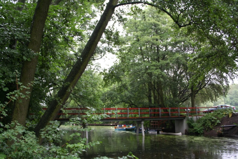 Description Bro over Susåen mellem Kanohuset og Rådmandshaven. Date13/8/da:2006SourceEget billedeAuthorMorten SiebuhrPermission (Reusing this file) Kreditering kræves Bro over Susåen mellem Kanohuset og Rådmandshaven.